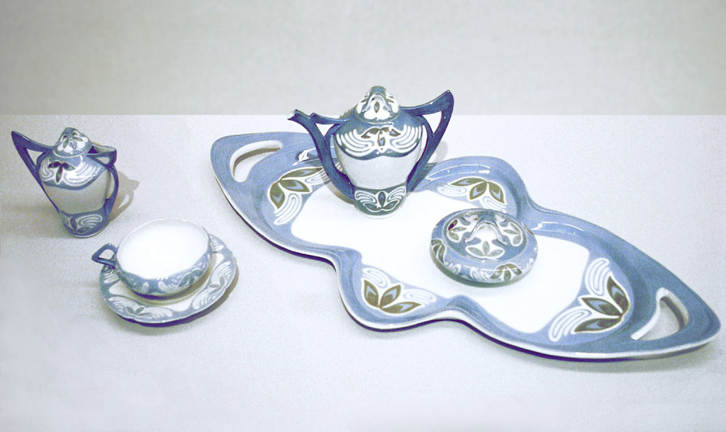 Jugendstilservice 1902 (Original text: Service nach einem Entwurf von Theodor Grust 1902.) Das Service zeigt die für das Kunstgewerbe des Jugendstils typische Linienführung. Anmerkung zur Aufnahmequalität: Das Foto ist von mir am PC stark nachbearbeitet worden, da die musealen Aufnahmebedingungen nicht optimal waren. Abweichungen in der Farbe der Glasur sind daher nicht auszuschließen. Es wäre gut, wenn dieses Bild durch eine bessere (gemeinfreie) Abbildung ersetzt werden könnte. Hinweis zur Lizenz: gemeinfrei wegen Ablauf der 70-Jahre Schutzfrist bei dem gezeigten Designobjekt. Theodor Grust: geb. 1859 in Meissen, gest. 1919.